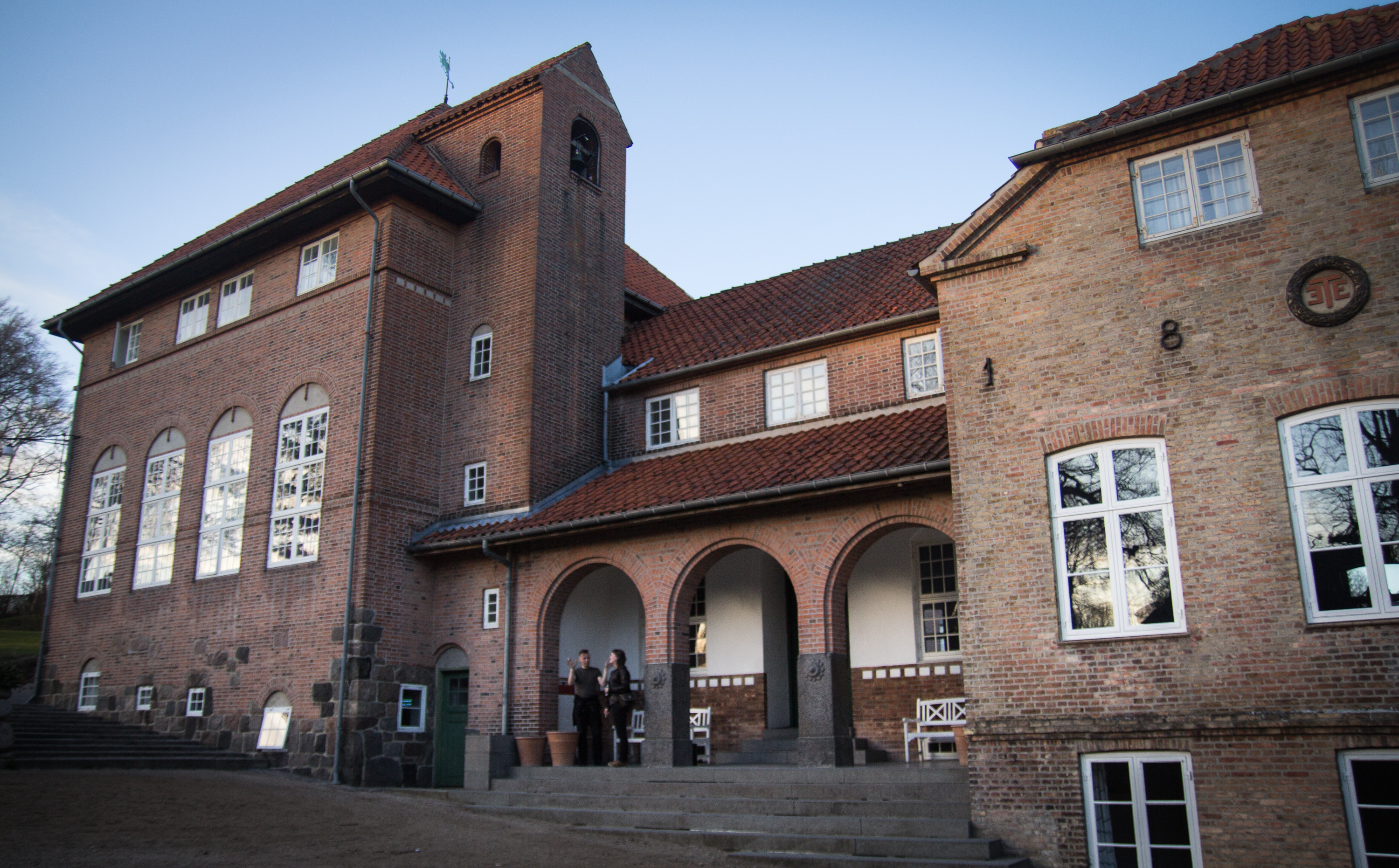 Vallekilde Folk Gigh School in Odsherred, Denmark